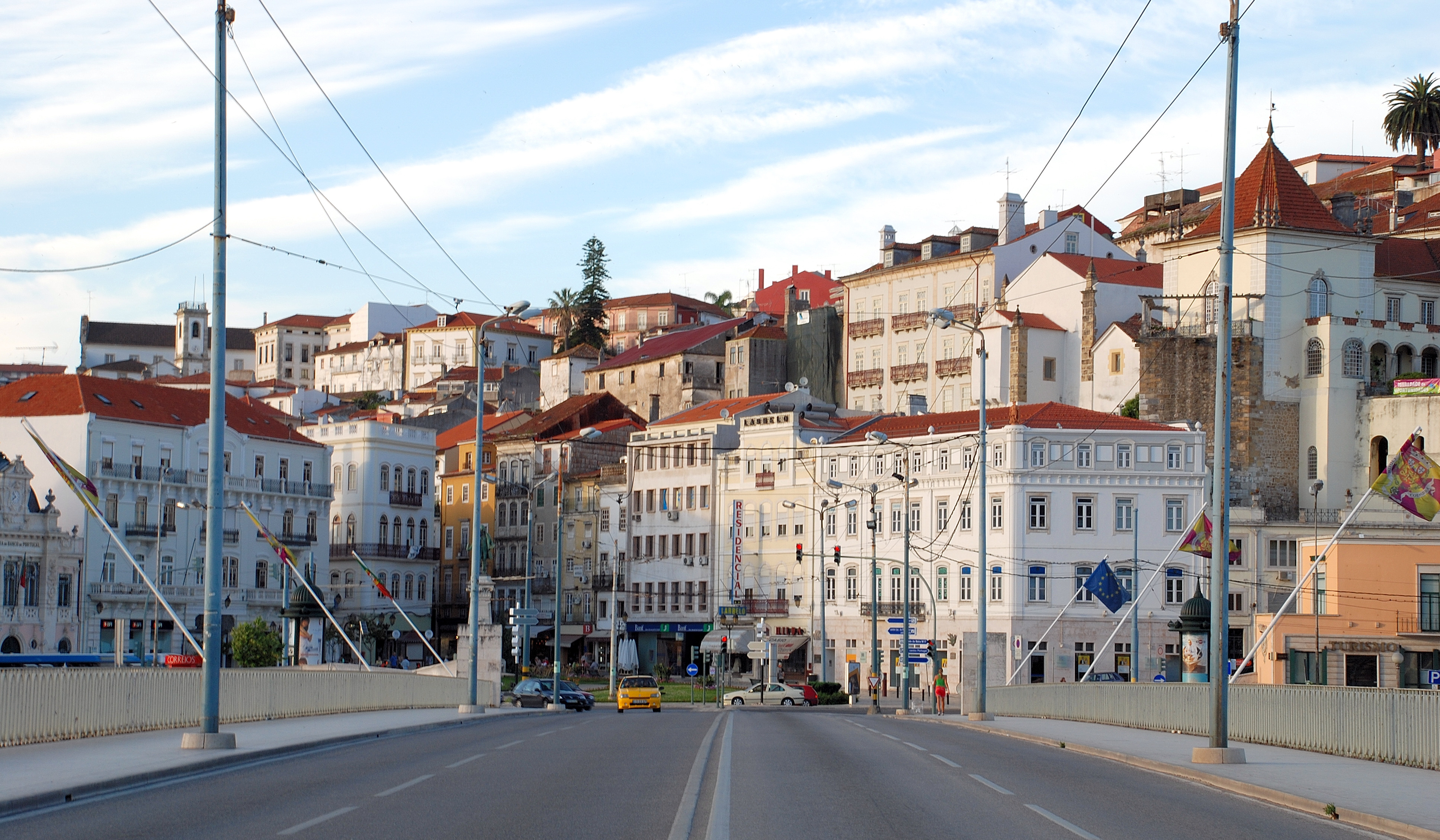 Portagem Square in Coimbra, Portugal